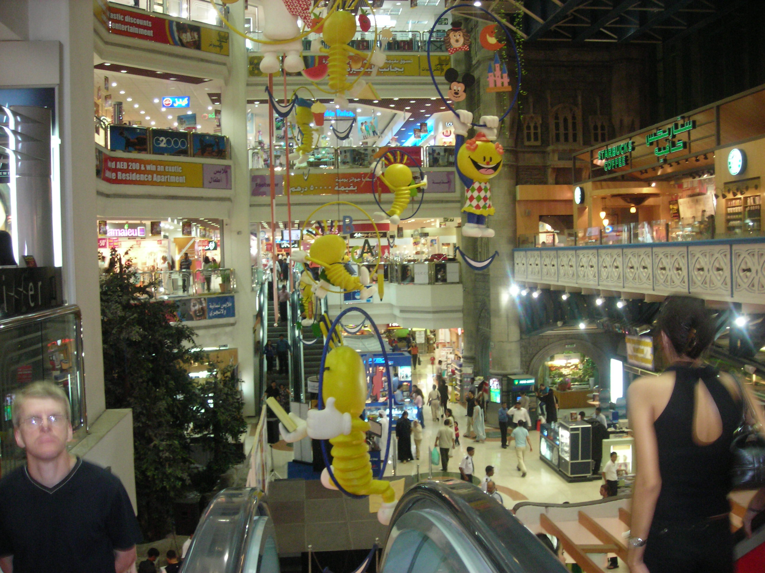 Lamcy Plaza, Dubai